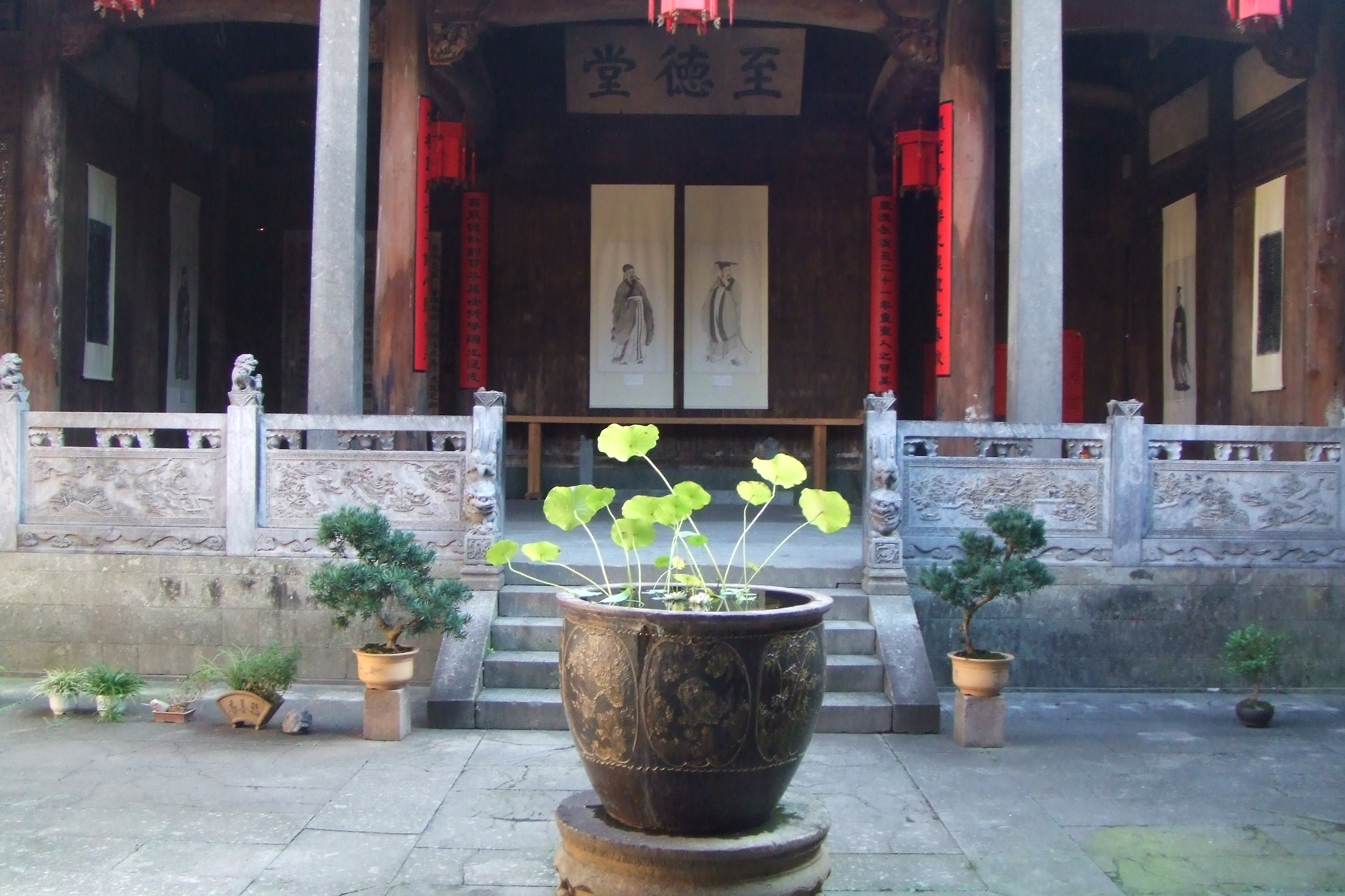 安徽省黃山市歙縣北岸鎮吳氏宗祠至德堂